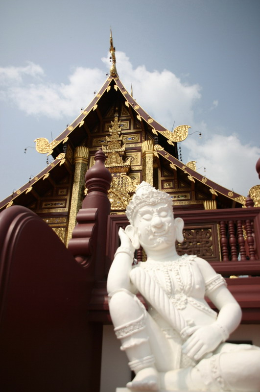 Royal Pavilion in Royal Flora Expo 2006, Chiangmai, Thailand